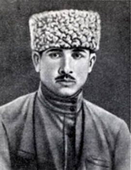 Асланбек Джемалдинович Шерипов, один из руководителей борьбы за Советскую власть на Северном Кавказе в годы Гражданской войны.